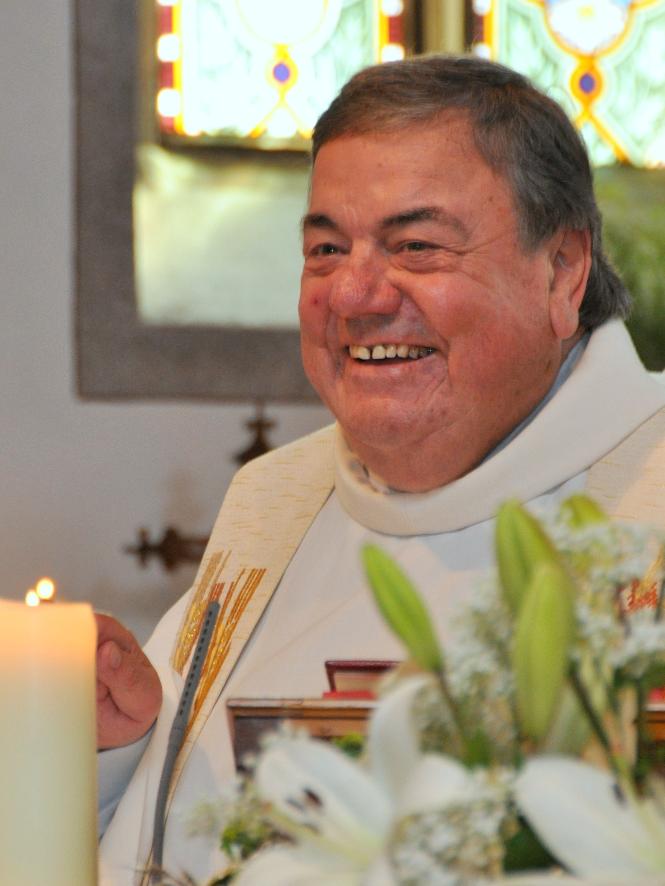 Pfarrer Hermann Scheinecker in liturgischem Gewand bei einer Messfeier in der Pfarrkirche St. Gotthard